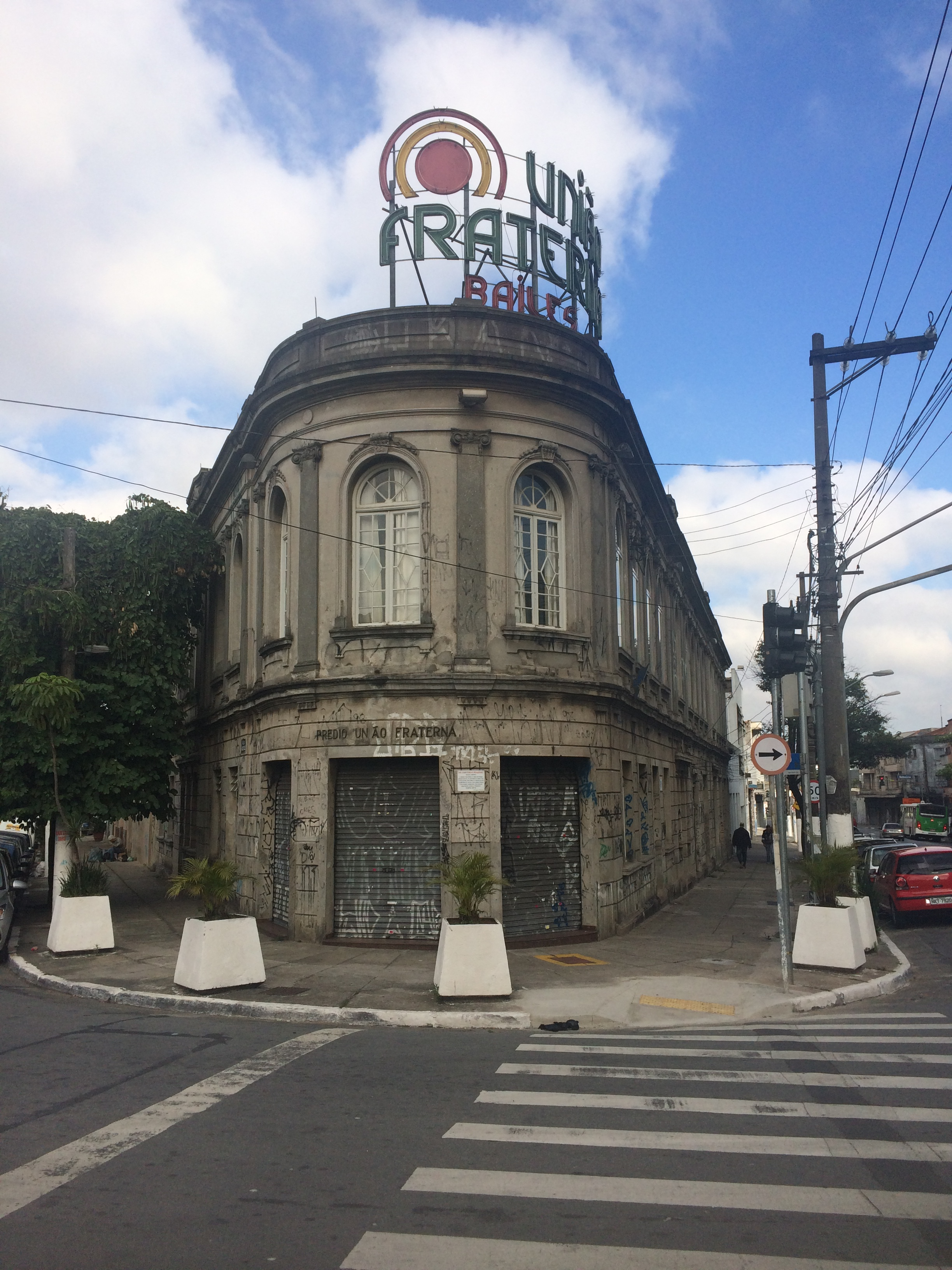 O edifício da Sociedade Beneficente União Fraterna está localizado na esquina das ruas Guaicurus e Faustolo, no bairro Água Branca, Zona Oeste de São Paulo.